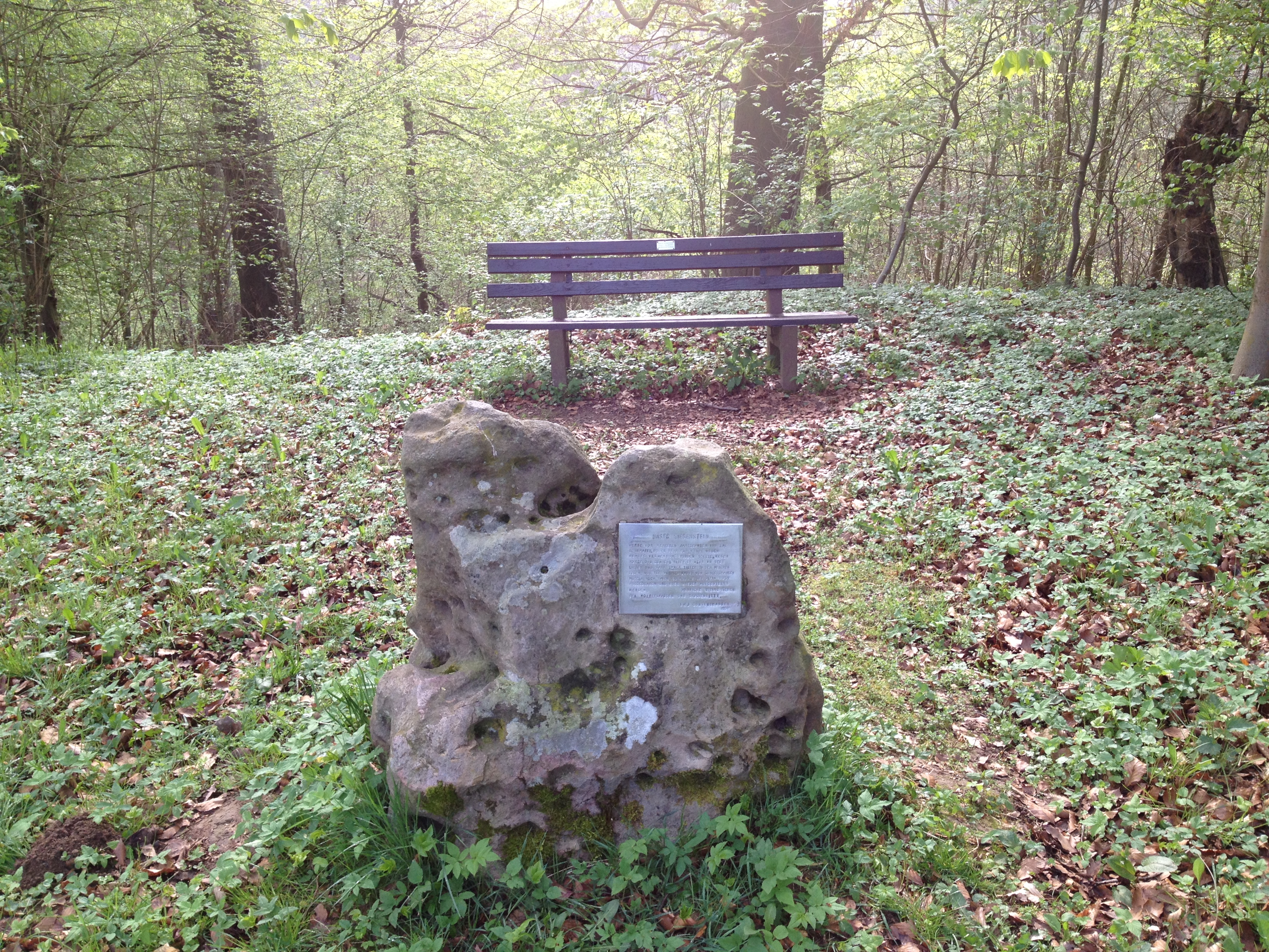 Eco Pfad Kulturgeschichte Guntershausen, Kassel-Steig, Baunapfad